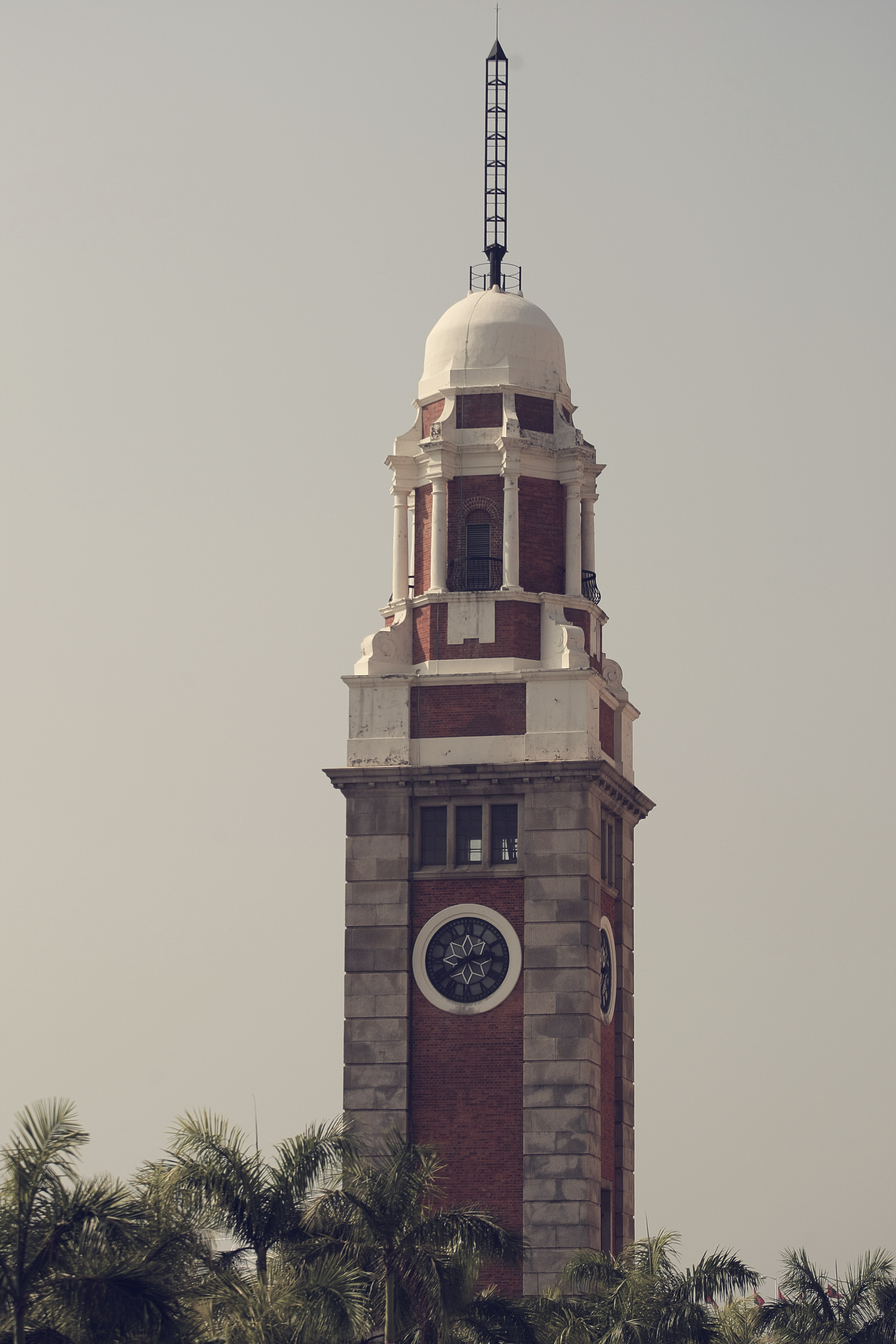 Former Kowloon-Canton Railway Clock Tower. Чимсачёй, Гонконг